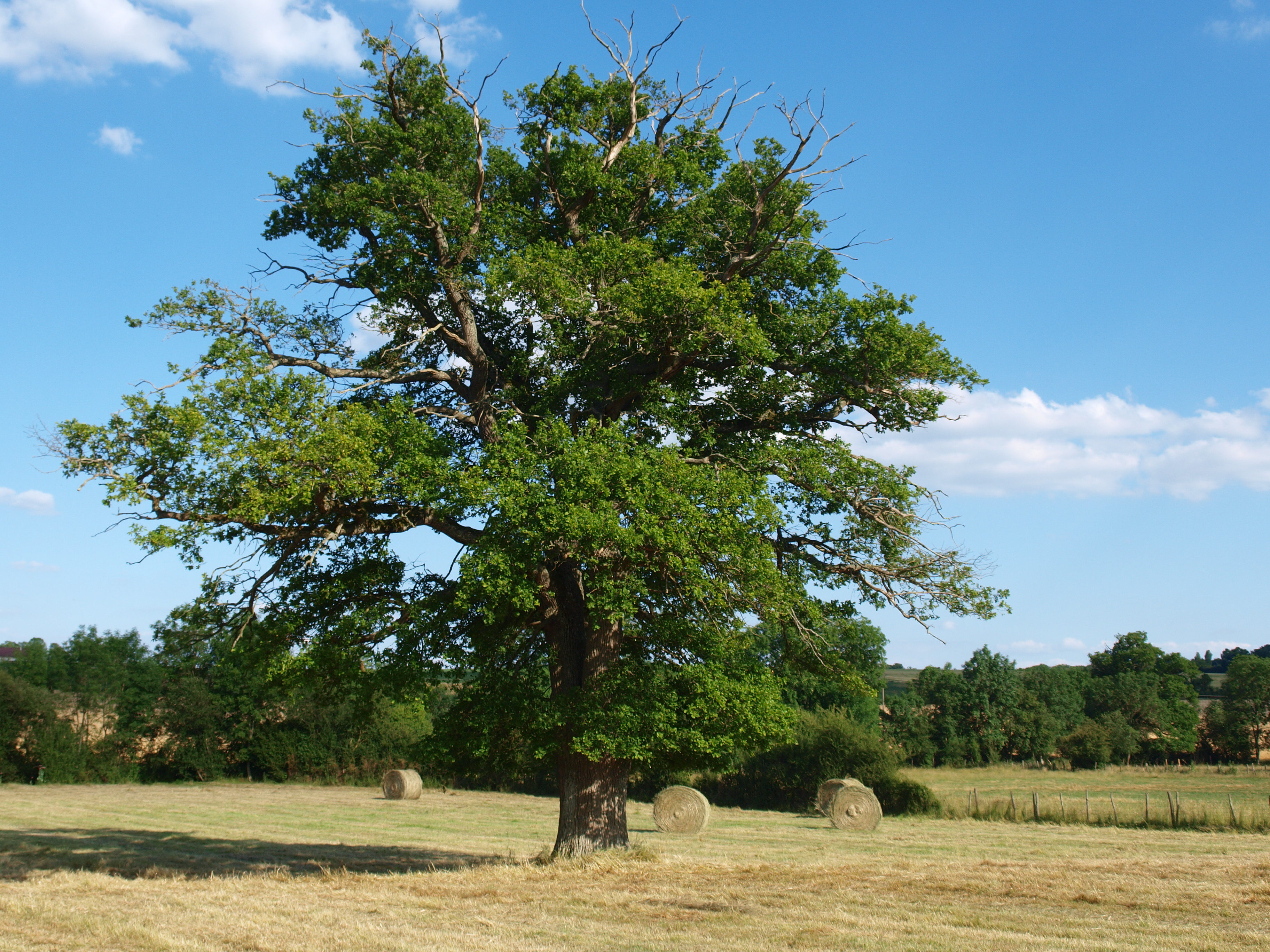 Lalande (Yonne, France) ; balles rondes de foin dans une pâture enclose de haies, avec un chêne de pâture au centre.